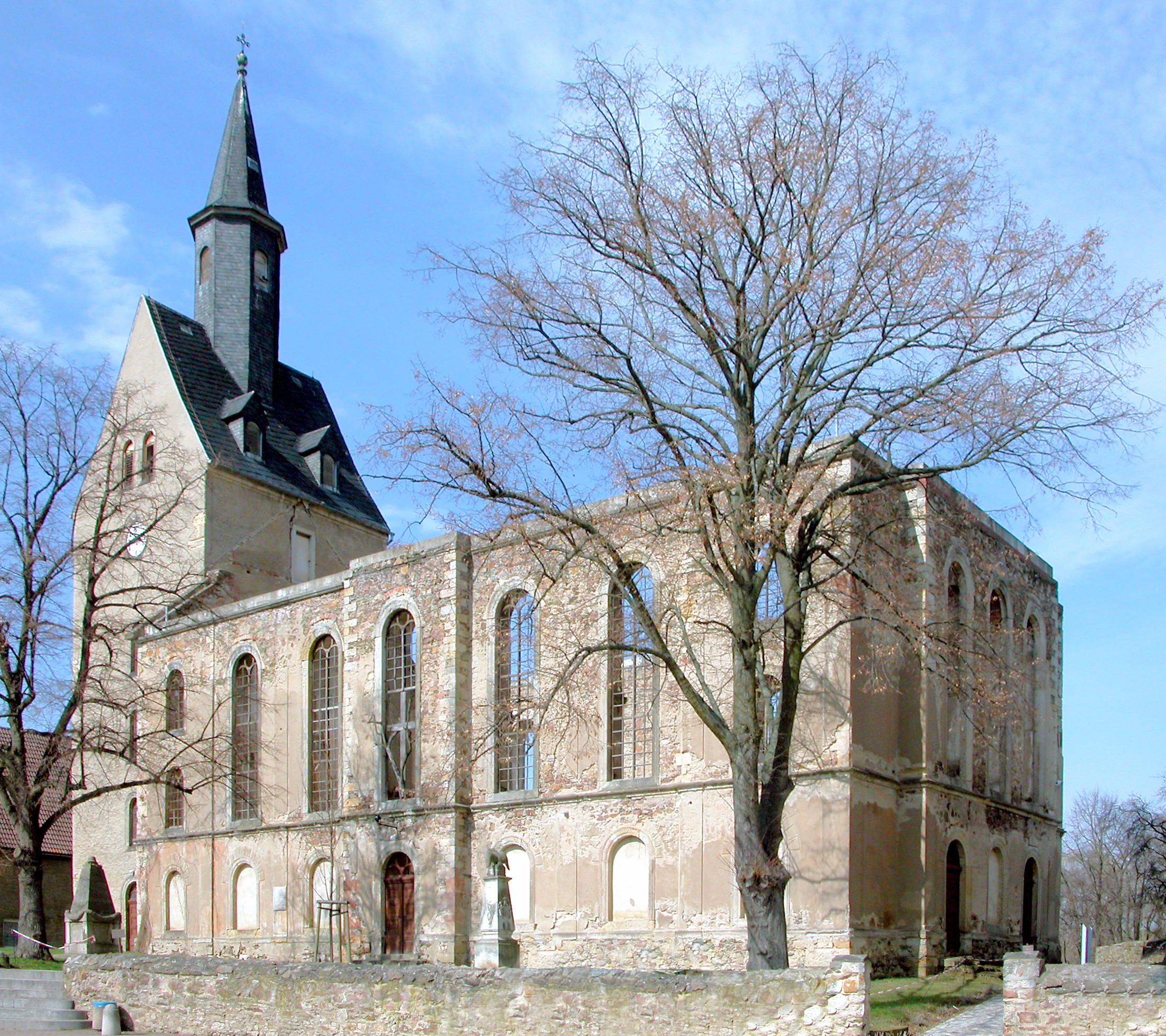 30.03.2010 04720 Mochau (Döbeln): Dorfkirche, Kirchstraße (GMP: 51.136848,13.188483). Von der romanischen Dorfkirche aus dem 13. Jahrhunderts blieb der Kirchturm erhalten. 1848/49 errichtete man ein größeres Kirchenschiff. In den 1960er Jahren wurde im Dachstuhl Hausschwamm festgestellt. Das Gotteshaus wurde 1971 aufgegeben und nur noch als Lagerraum genutzt. 1984 wurde das einsturzgefährdete Dach abgetragen. Ab 1998 zeitweise als "Sommerkirche ohne Dach" genutzt. [DSCN40622.TIF]20100330045DR.JPG(c)Blobelt